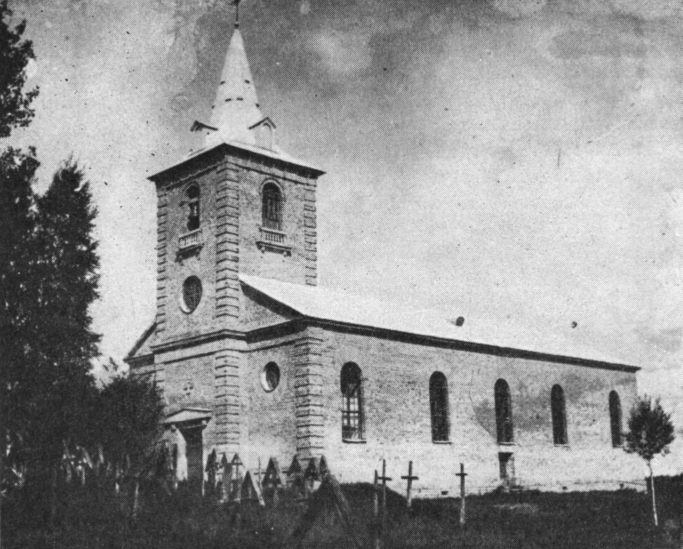 Кирха в деревне Шпаньково.